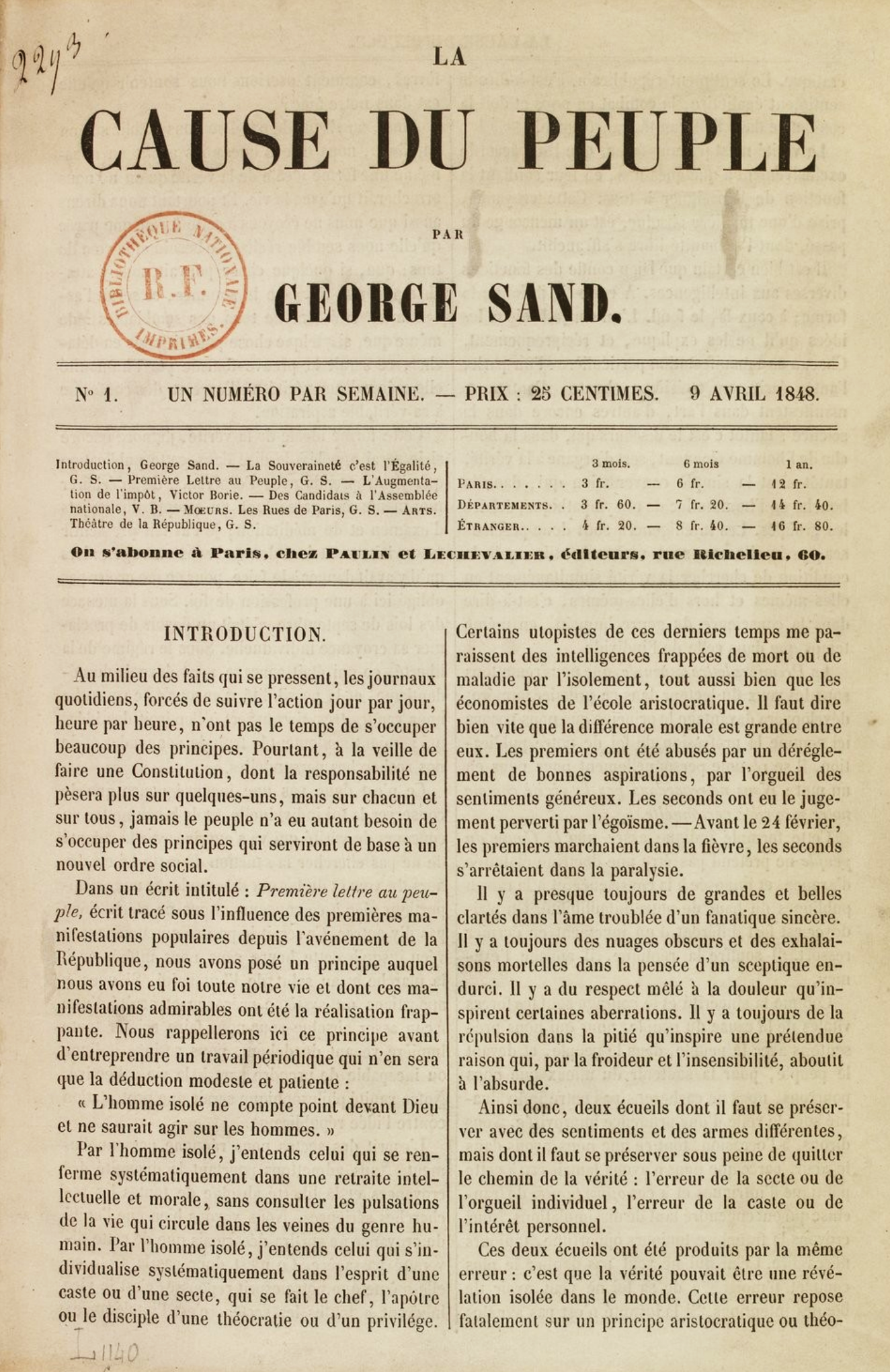 Une du numéro 1 de La Cause du peuple par George Sand, Paulin et Lechevalier éditeurs, 9 avril 1848.